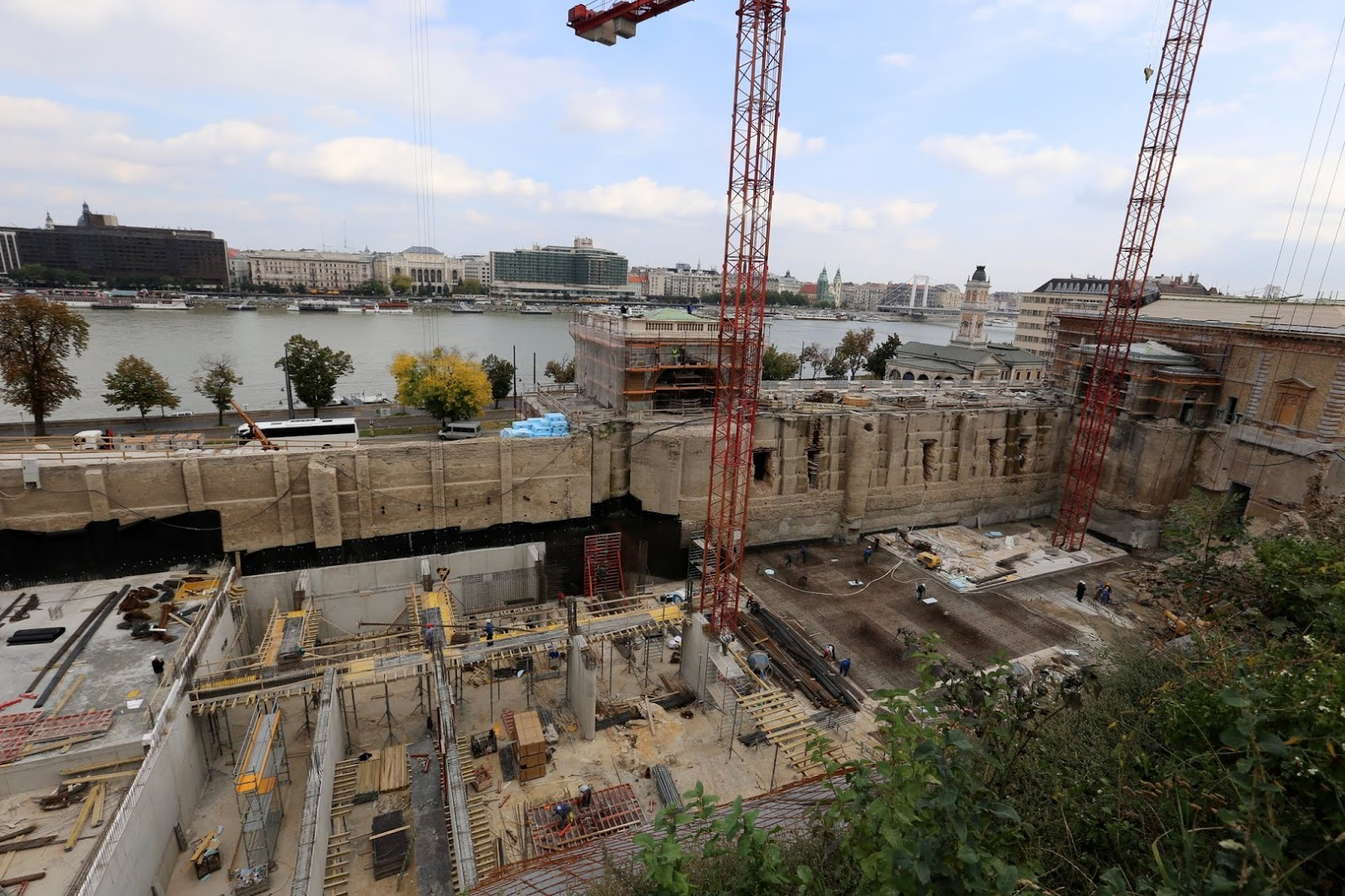 Várkert Bazár 2013 októberében